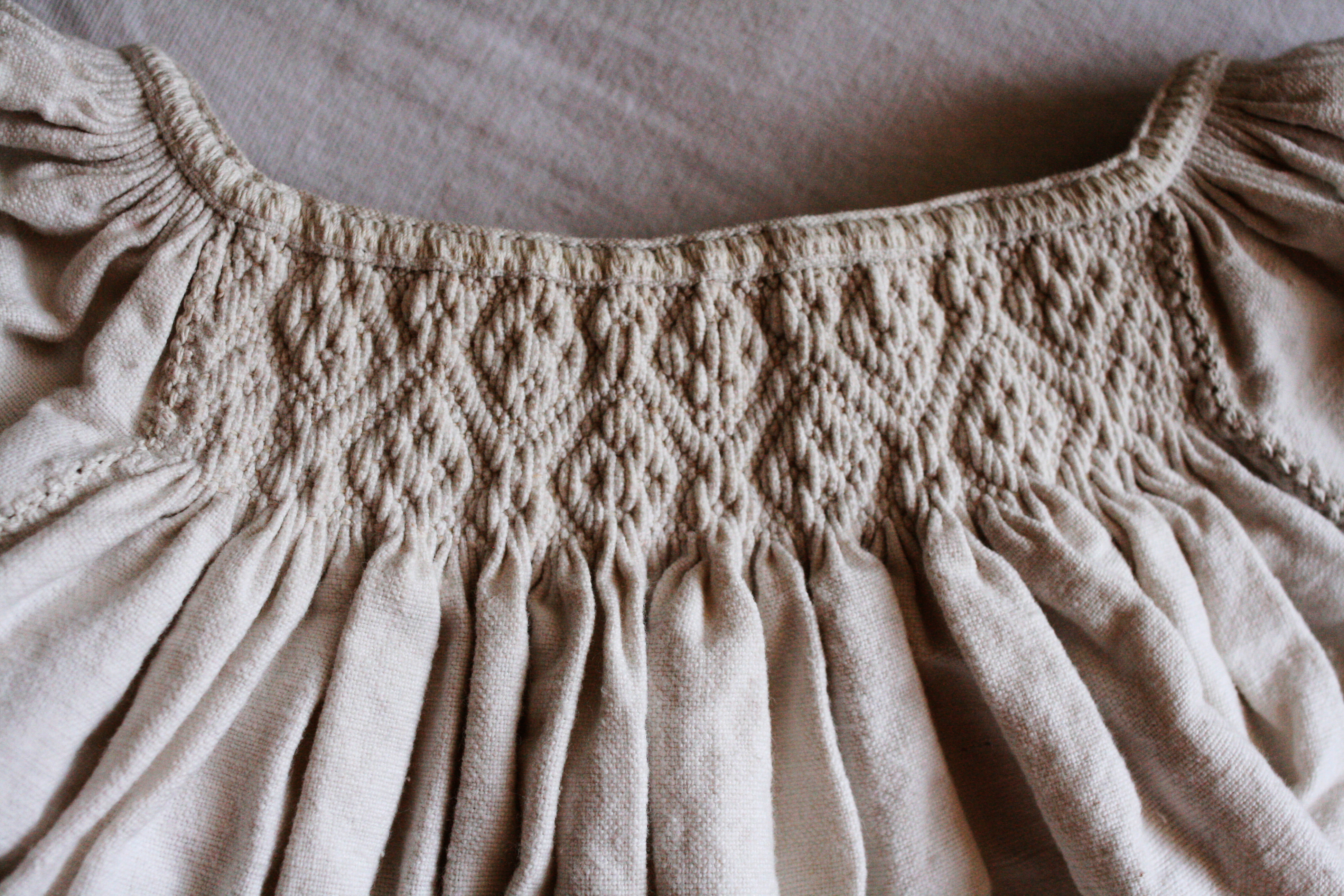 Barcasági csángó halóing ráncolása (Sepsiszentgyörgy, Erdély)